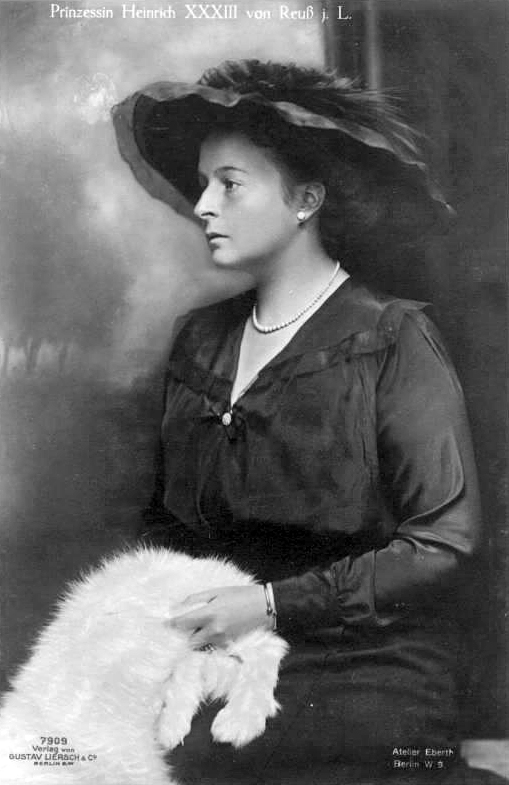 Prinzessin Viktoria Margarete von Preussen, 1913-1922 verheiratet mit Prinz Heinrich XXXIII. Reuß jüngere Linie